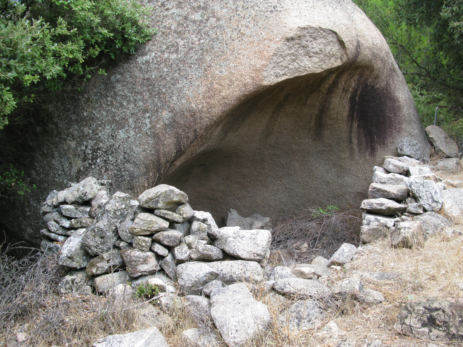 Resti di Capanna medioevale - Sedda Ortai (NU)